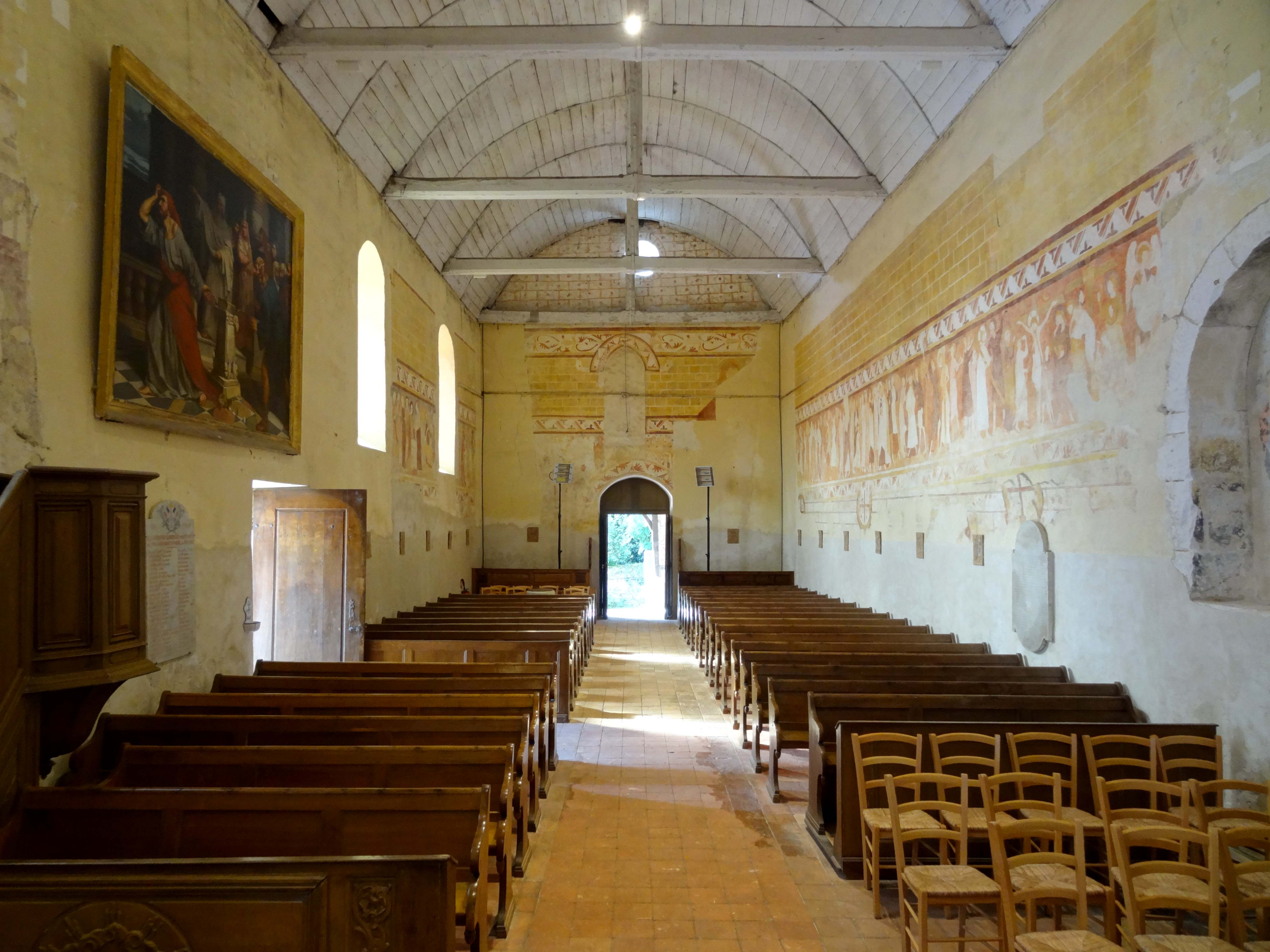 Intérieur de l'église - voir titre.